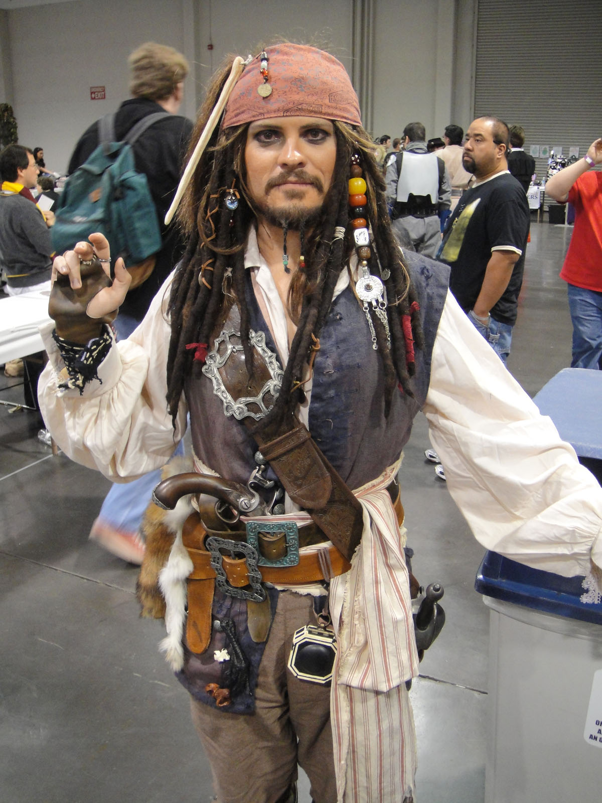 Fan in Jack Sparrow-Verkleidung